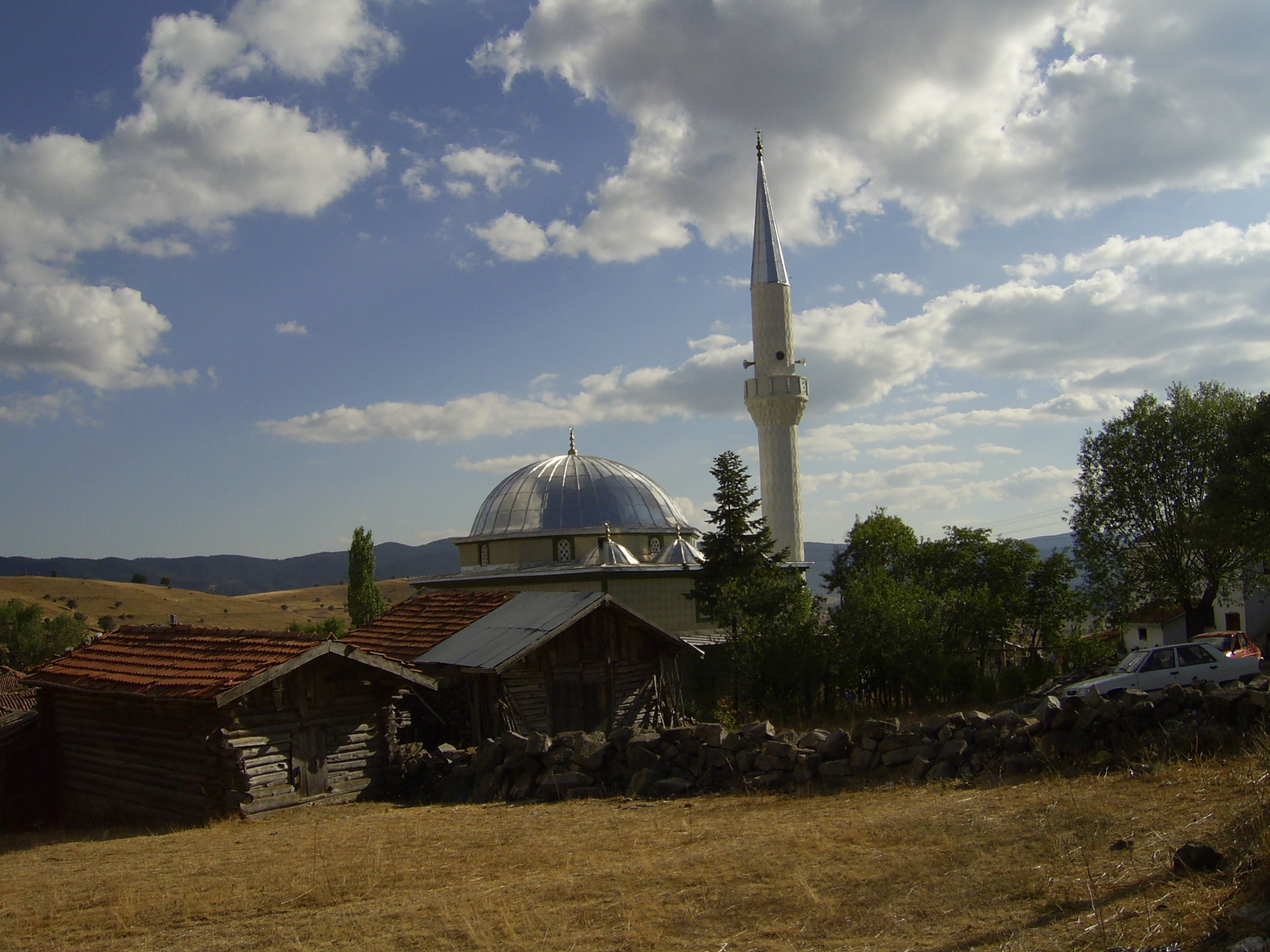 koy buyükboy resim cami